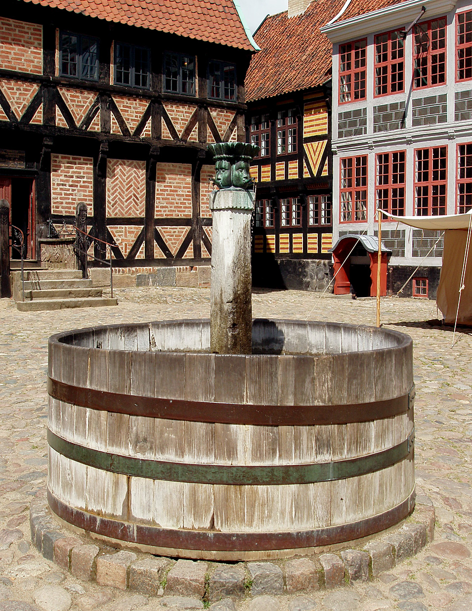 Bybrønden i Den Gamle By , Århus, Denmark